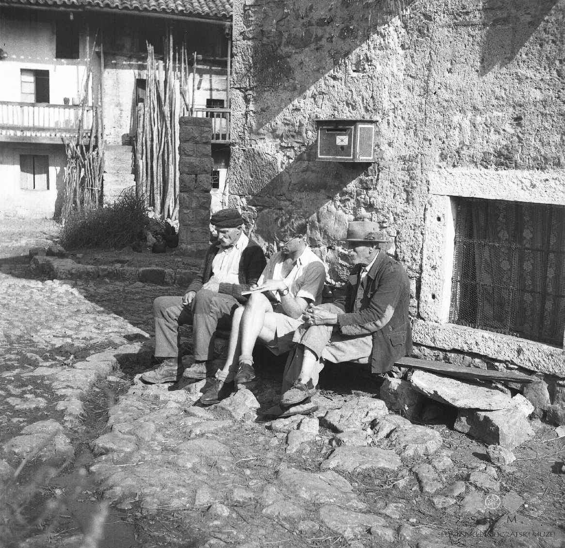 Pri zapisovanju: Tine Logar in Nardin Žnidarjev in Žvan Štefuov, Robidišče.